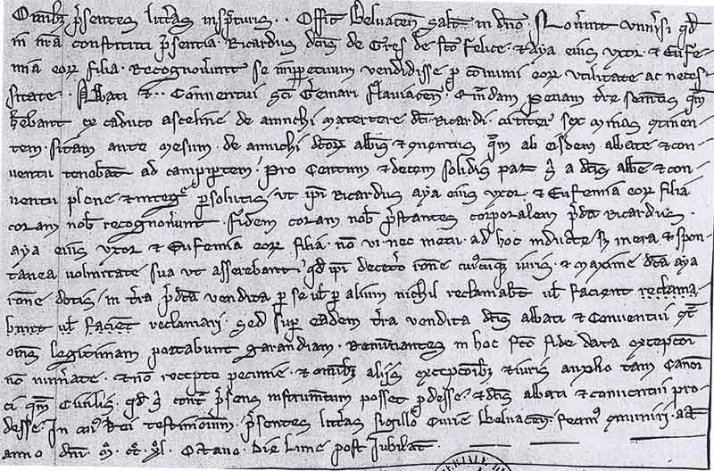 Acte d'officialité (Beauvais) du 11 mai 1248 au sujet d'une vente au bénéfice de l'Abbaye St-Germer-de-Fly